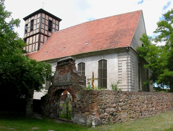 Stolec - dawny kościół ewangelicki, obecnie rzymskokatolicki filialny p.w. św. Maksymiliana Kolbe, 1731-1735